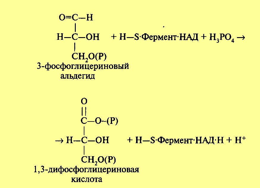 1,3 дифосфоглицериновая кислота в процессе гидролиза